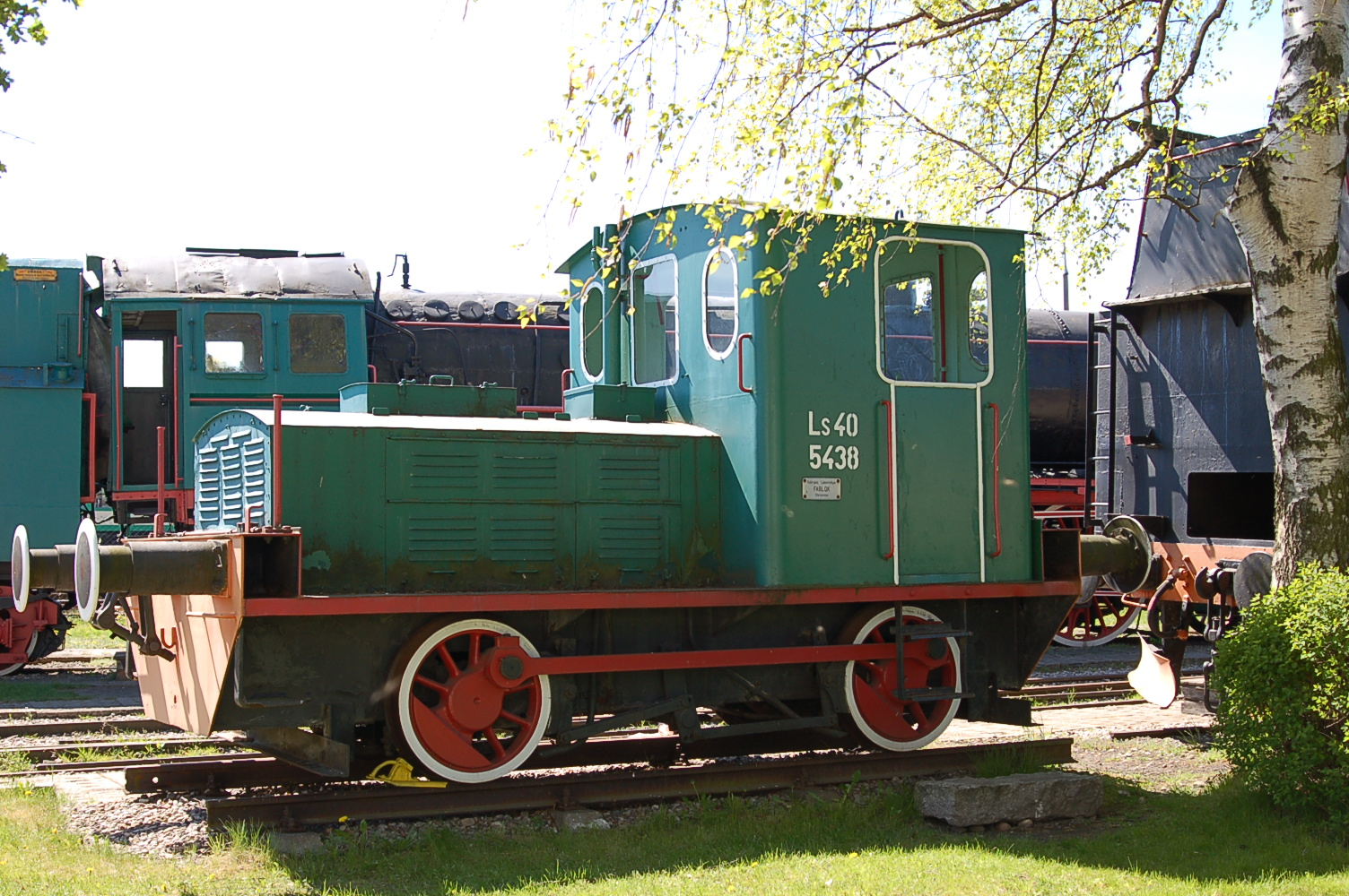 Ls40-5438 locomotive in Skansen Parowozownia Kościerzyna